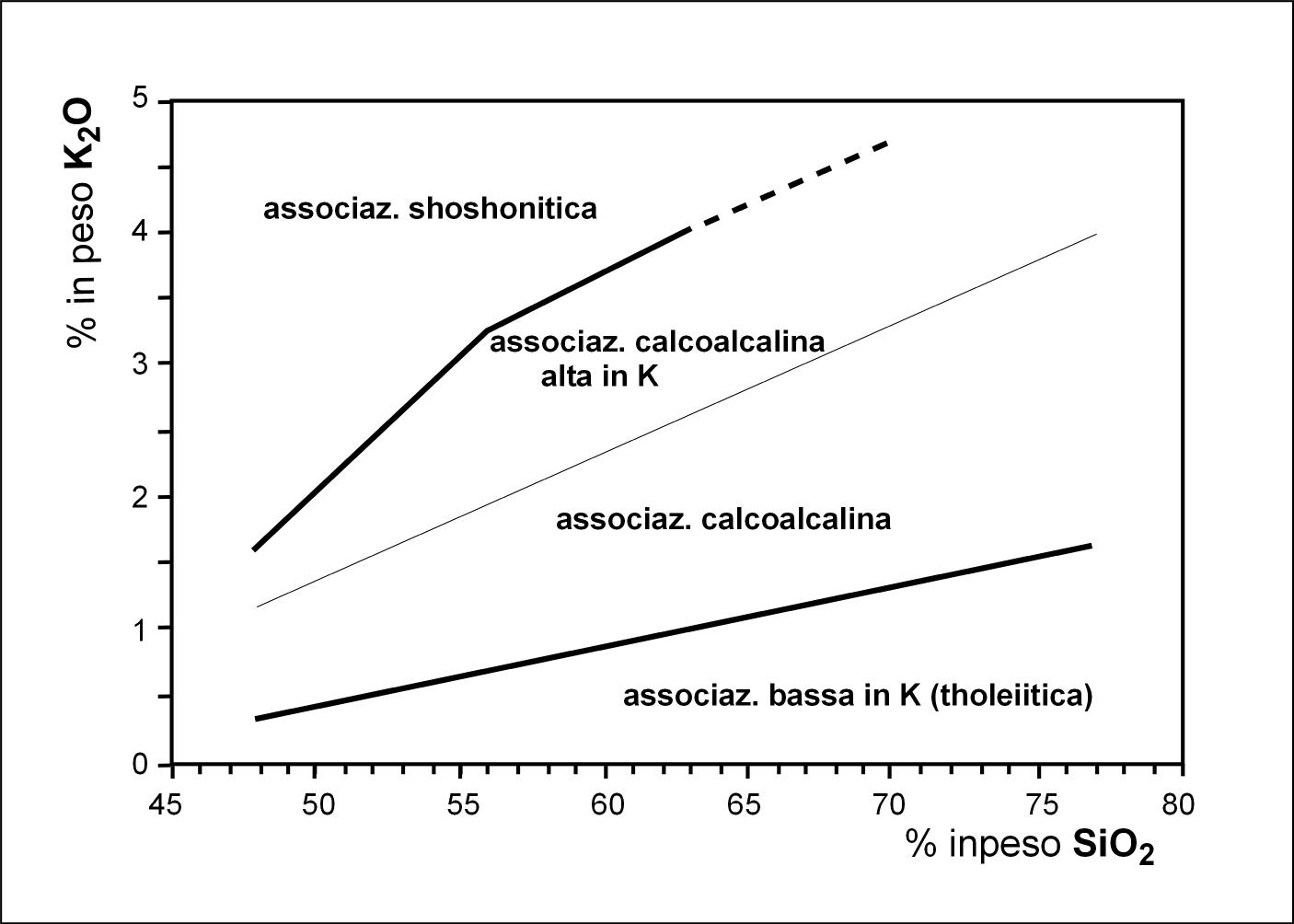 Assocciazioni magmatiche sulla base del rapporto in peso SiO2-K2O